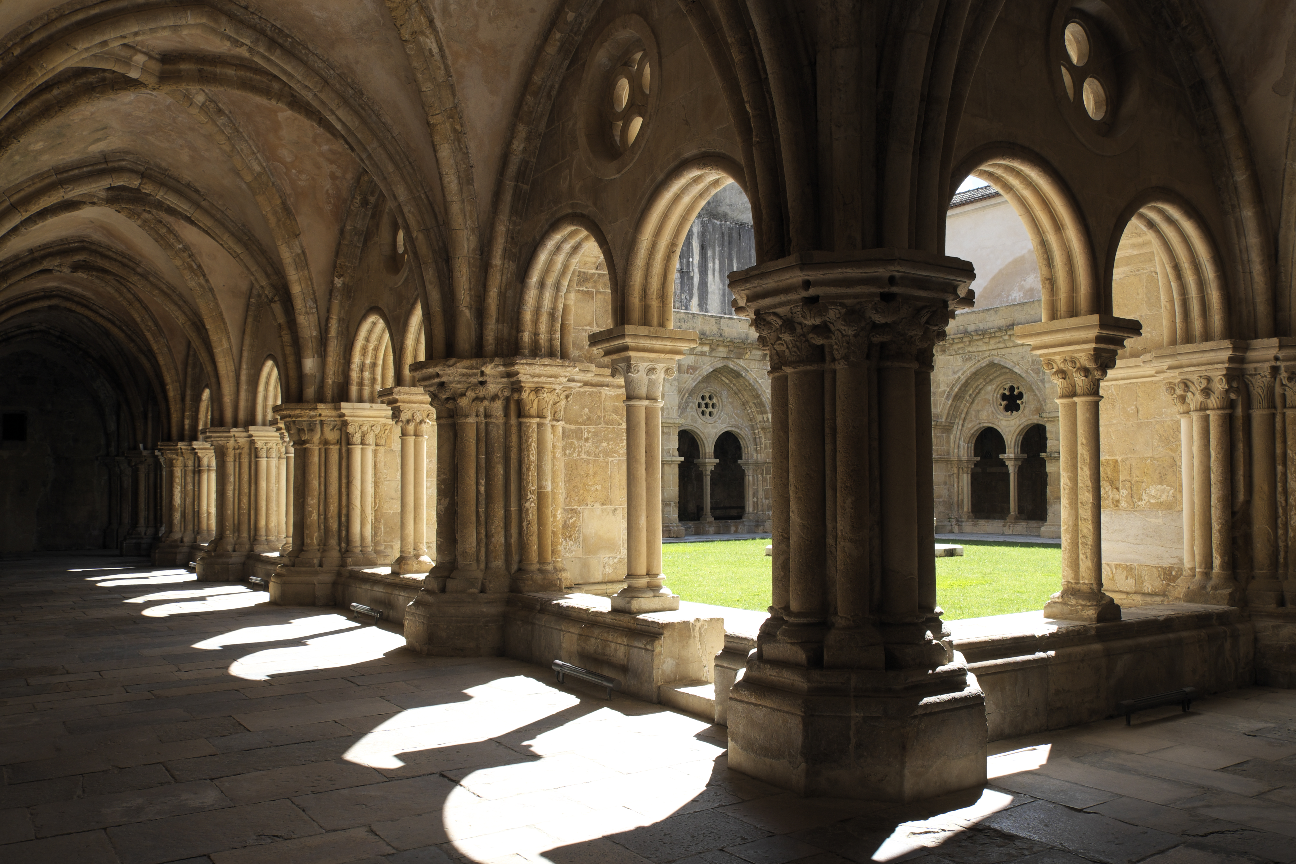 Frühgotischer Kreuzgang der alten Kathedrale Sé Velha in Coimbra in Portugal, aus dem 13. Jahrhundert